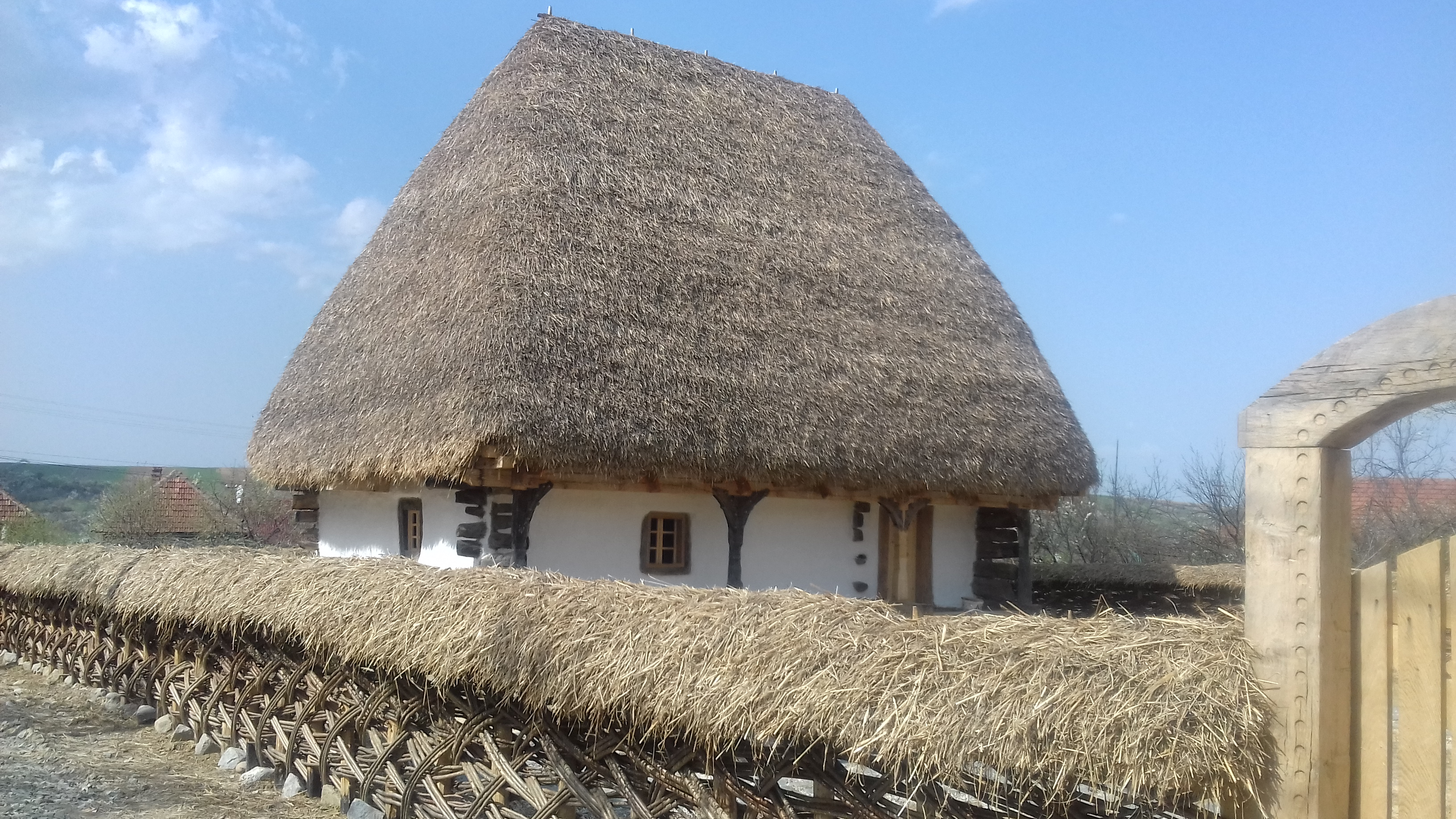 Casa Lupuț - Muzeul din Cizer (secolul XVIII)